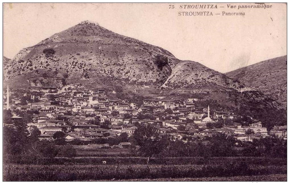 Панорама на Струмица в началото на 20 век.